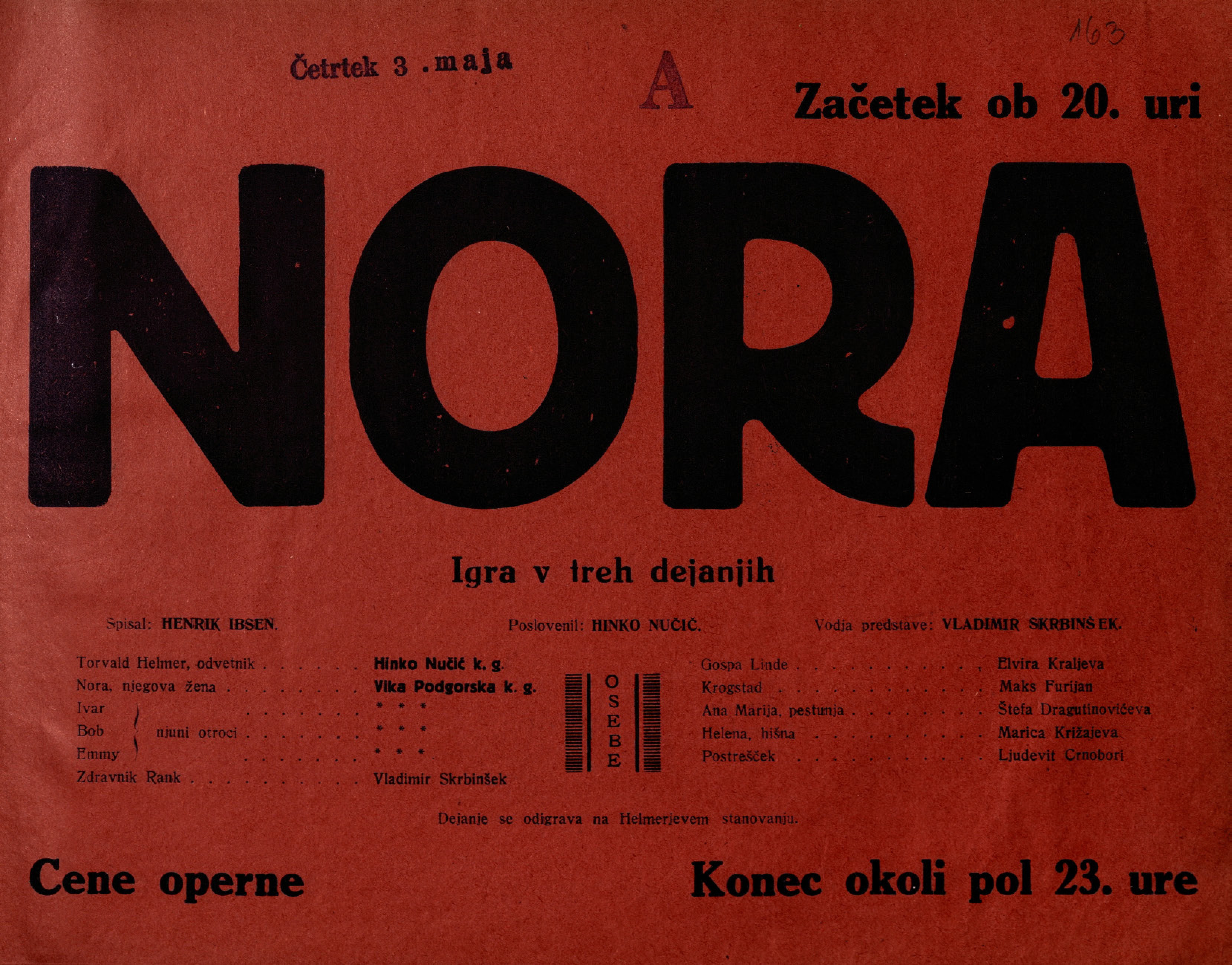 Plakat za predstavo Nora v Narodnem gledališču v Mariboru.